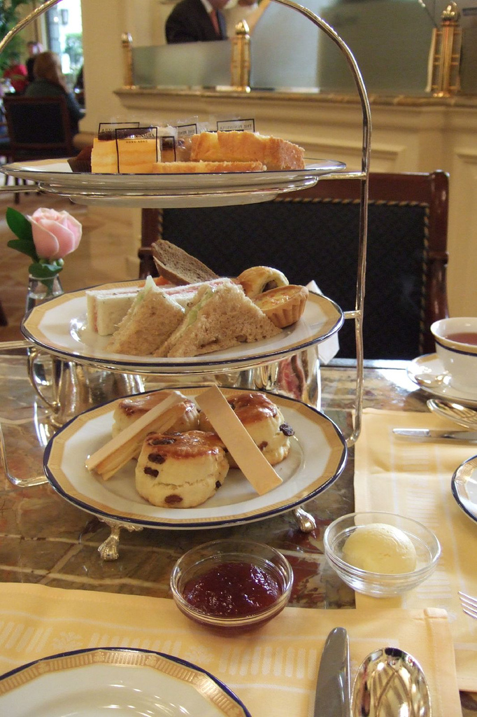 英式的高級下午茶. 半島酒店供應的英式下午茶.